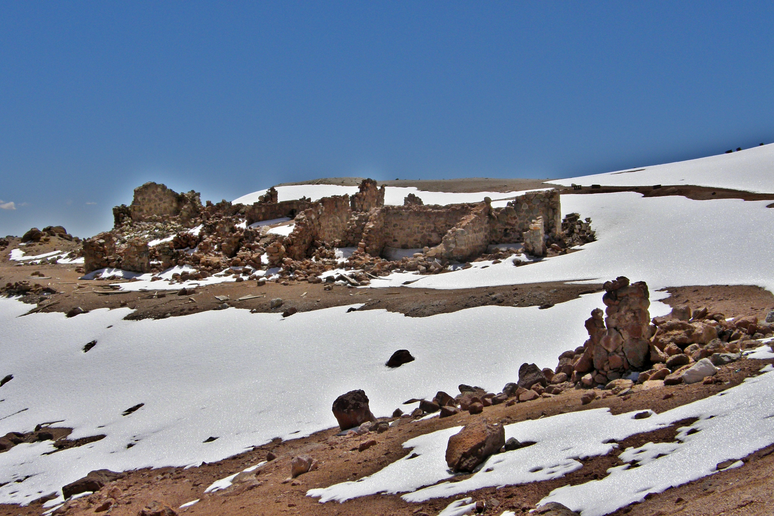 Ruines d'une ancienne exploitation de soufre (5100m ) sur le flan ouest du volcan Tuzgle, departamento de Susques, provincia de Jujuy, Argentina